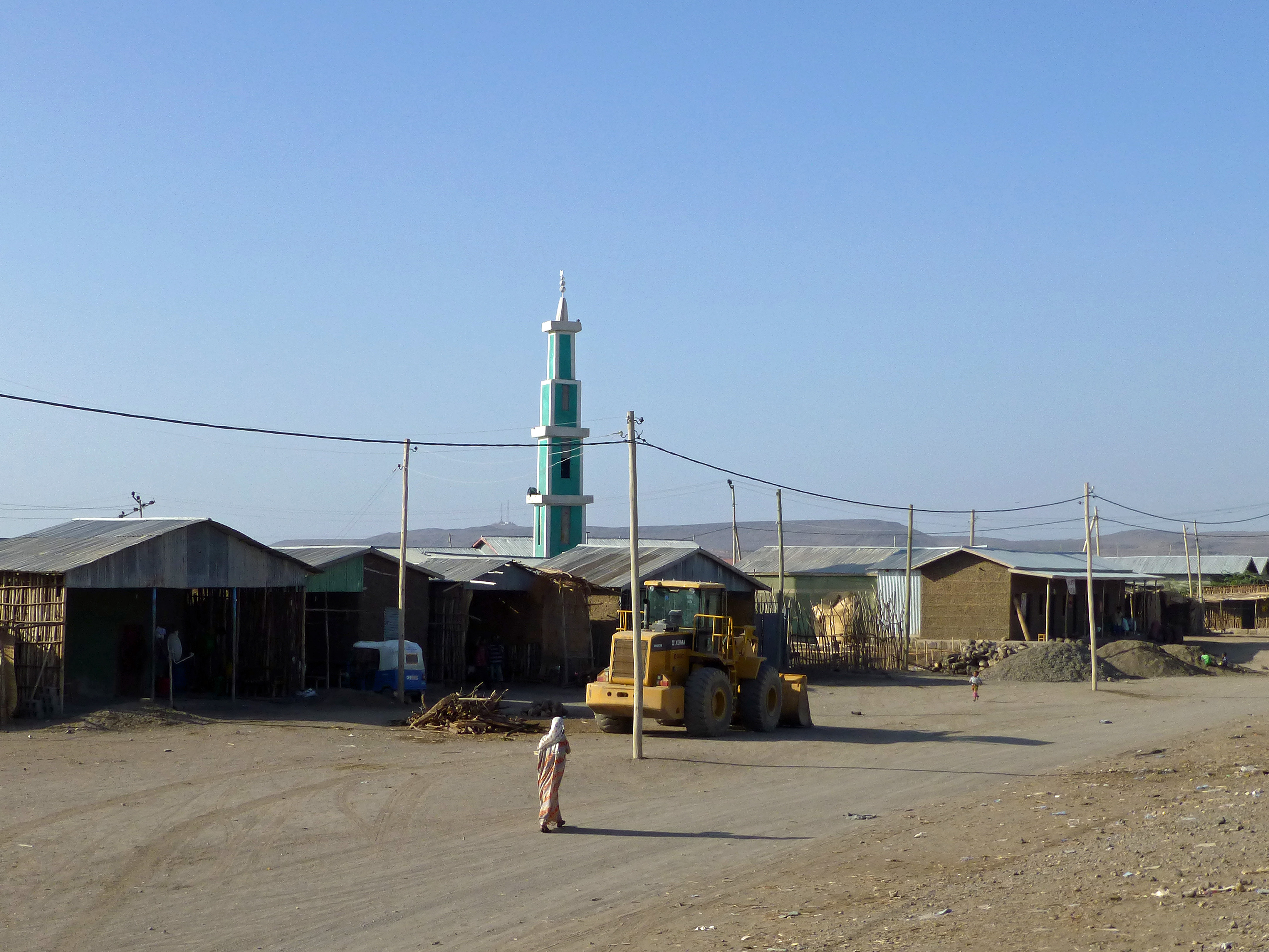 Localité d'Awash (région Afar, Ethiopie) : mosquée